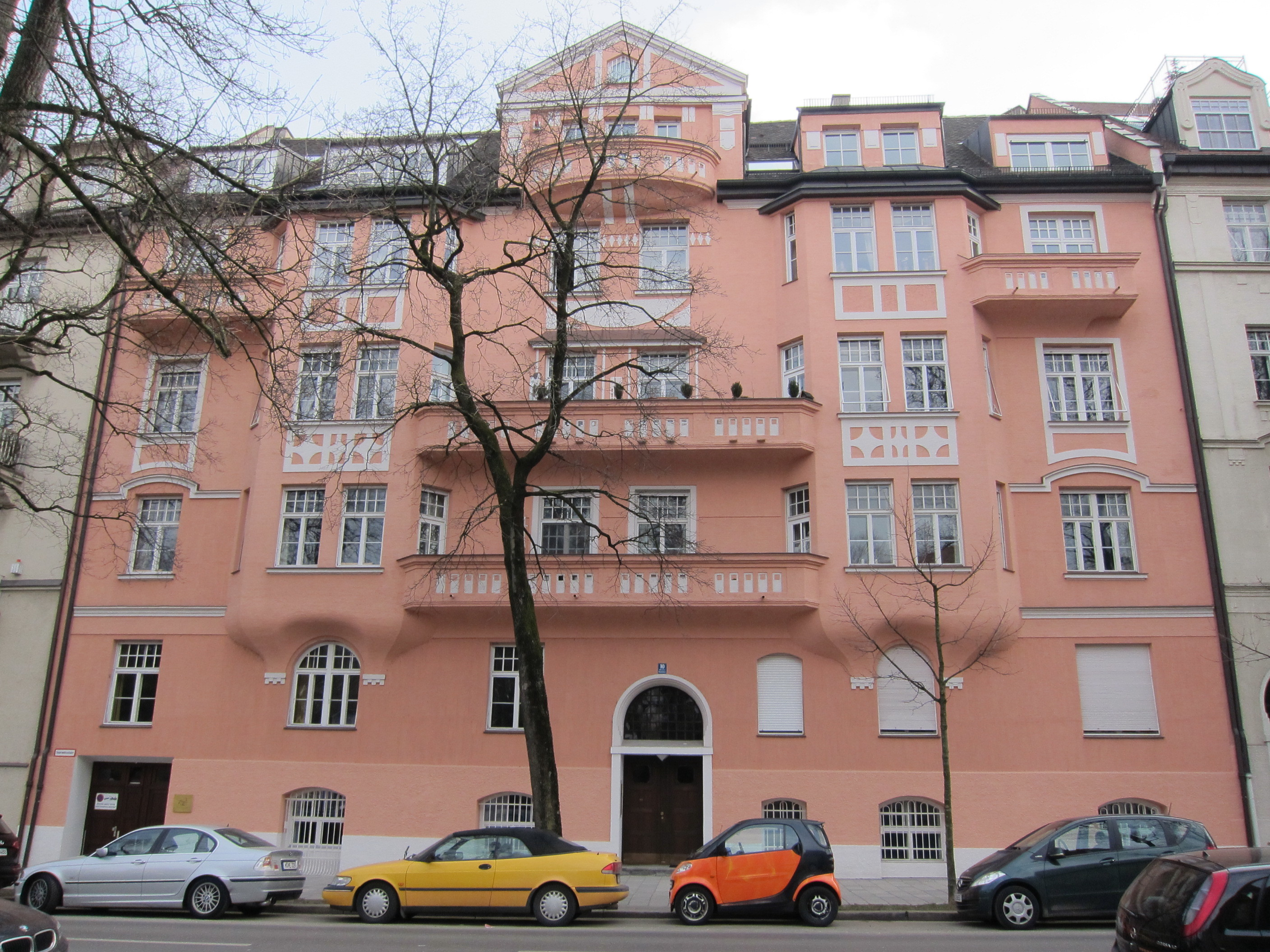 Mauerkircherstraße 10; Mietshaus, Jugendstil, reich gegliedert, um 1909-10, von Max Neumann mit Tekturplänen von Franz Popp.